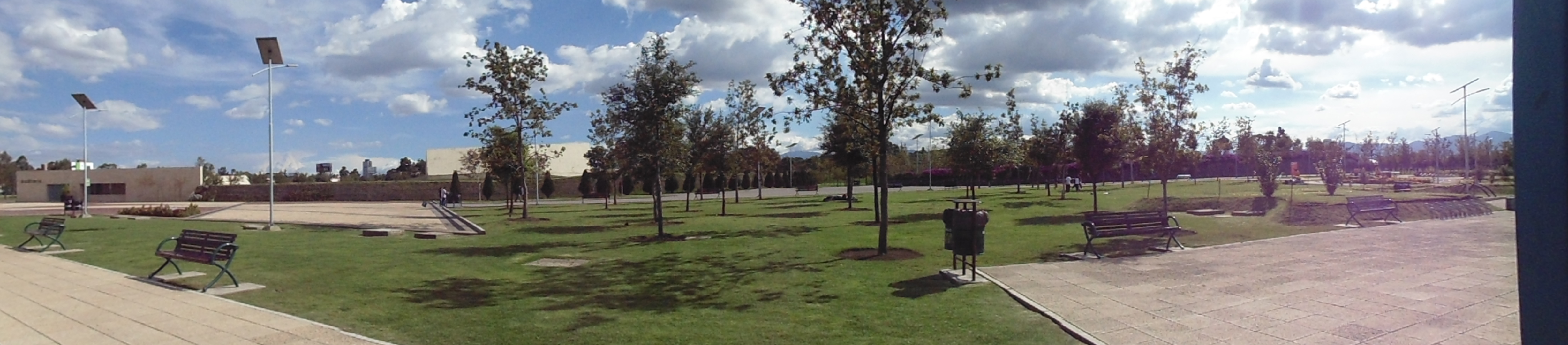 Parque Bicentenario.